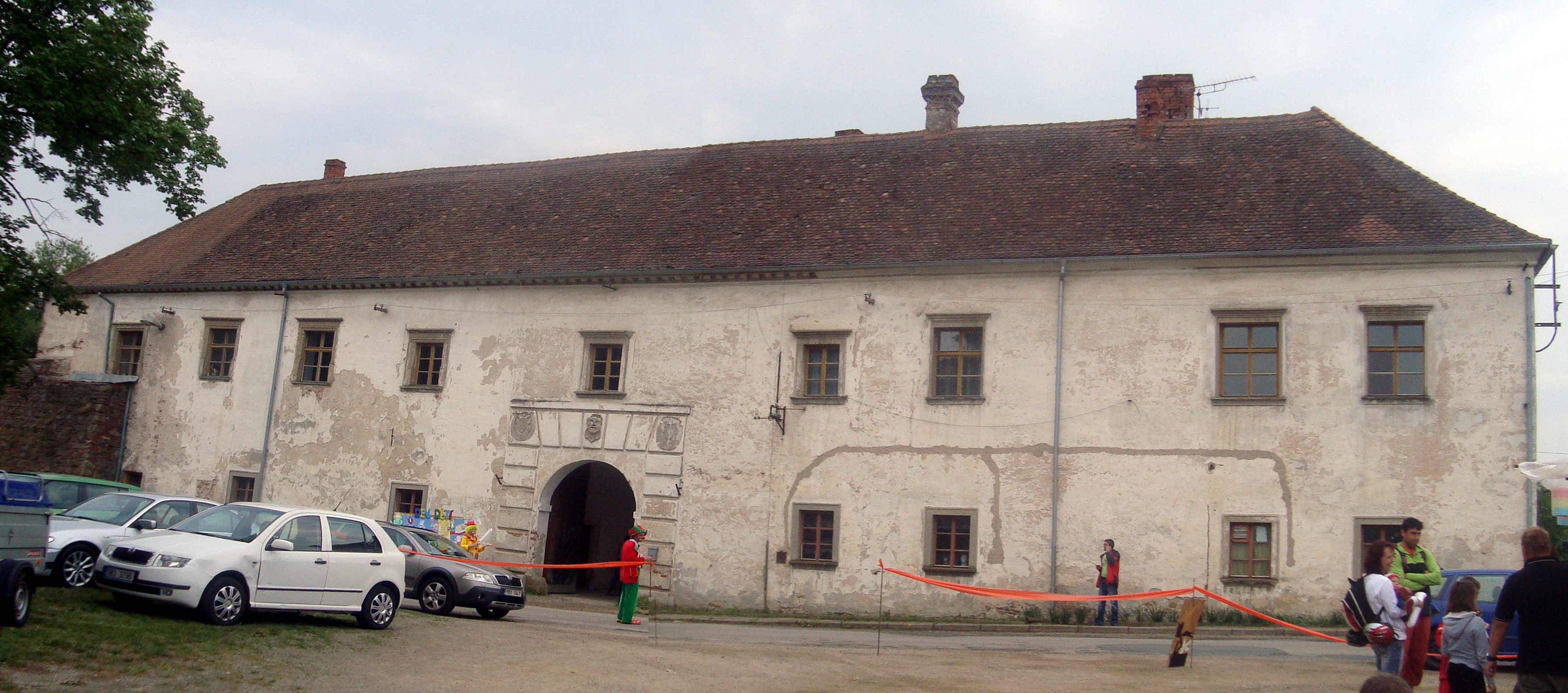 Hrubšice-zámek